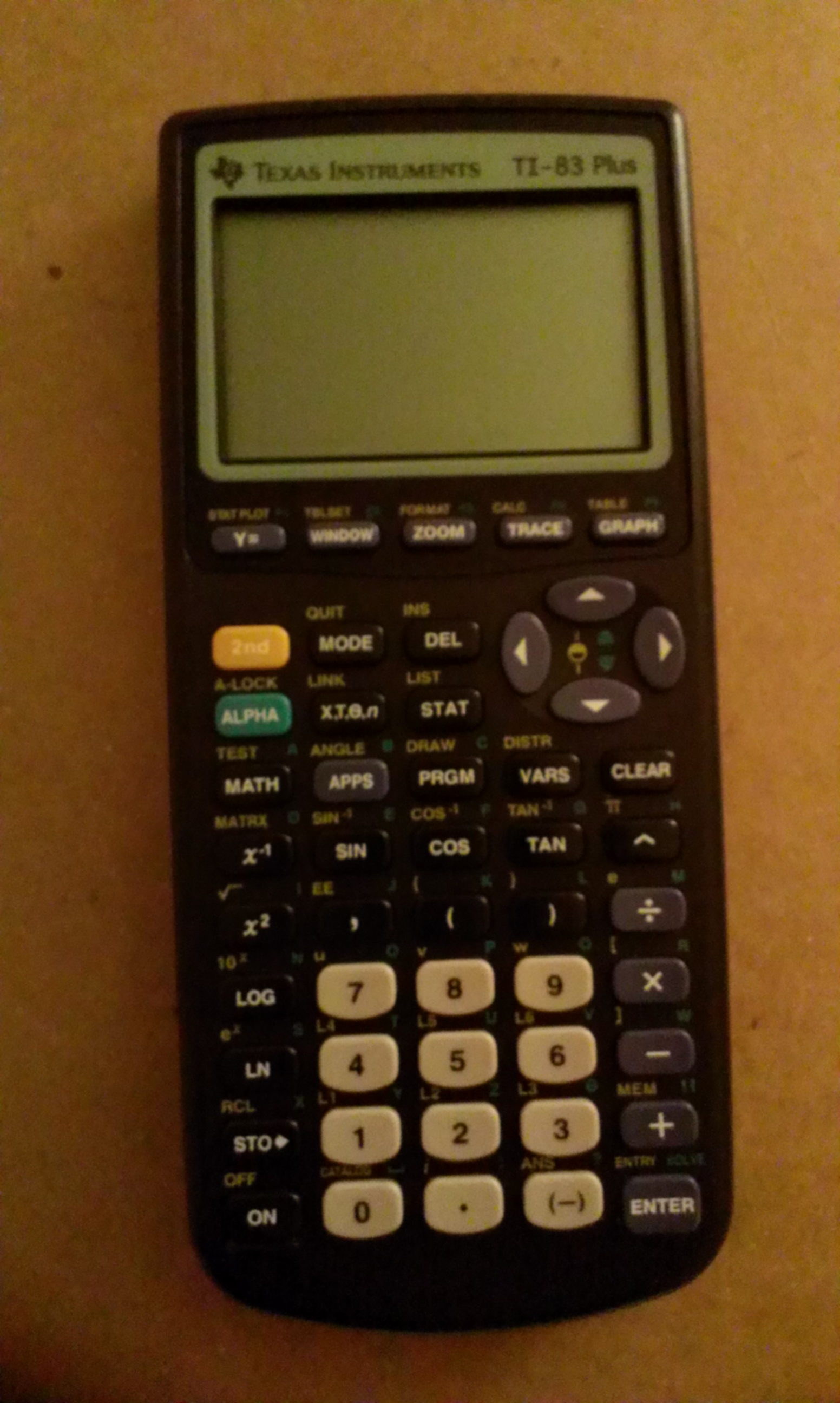 Calculadora Modelo TI-83 Marca Texas Instruments.